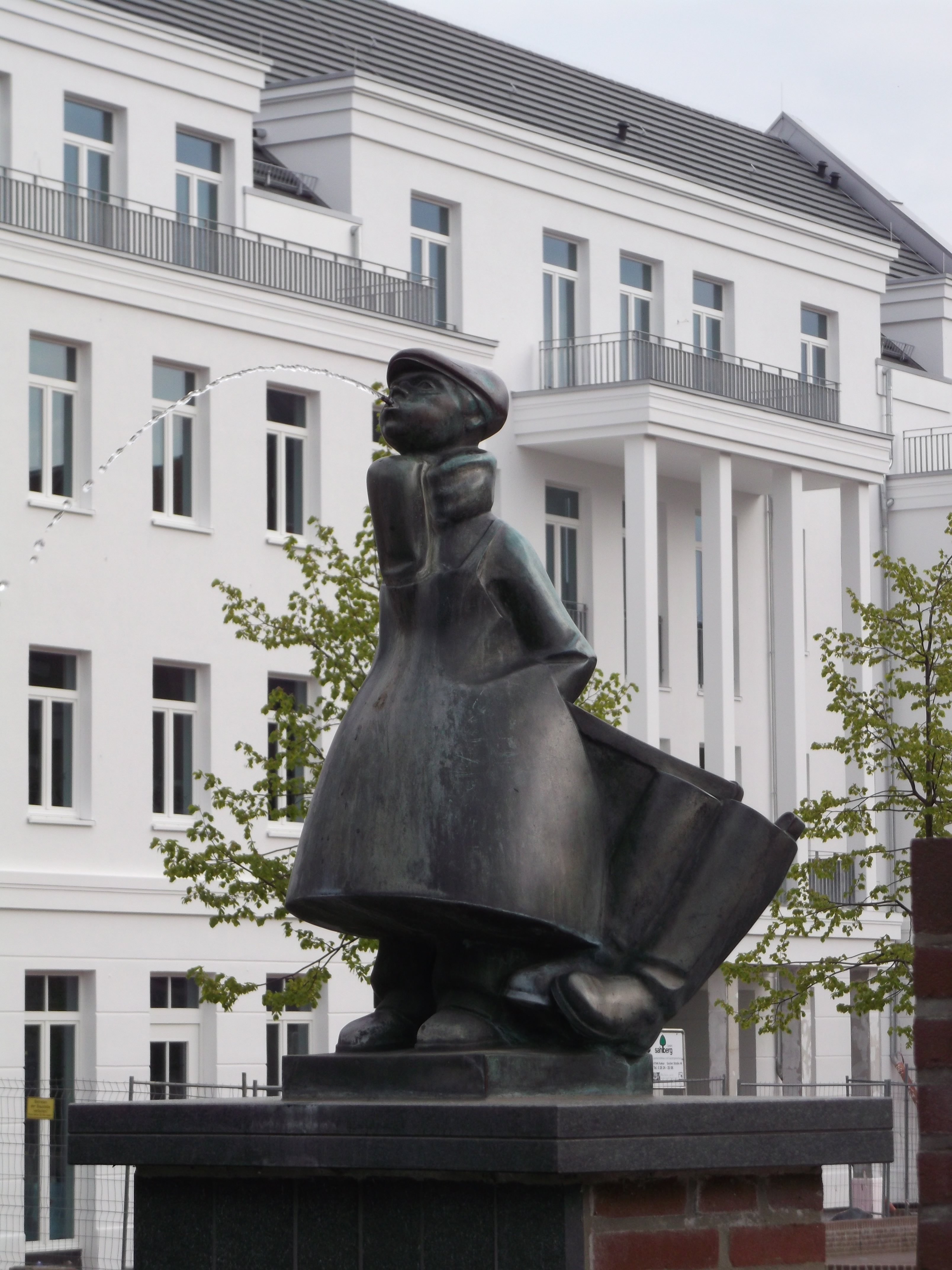 Kleves Wahrzeichen das Schüsterken, im Hintergrund das Spoypalais